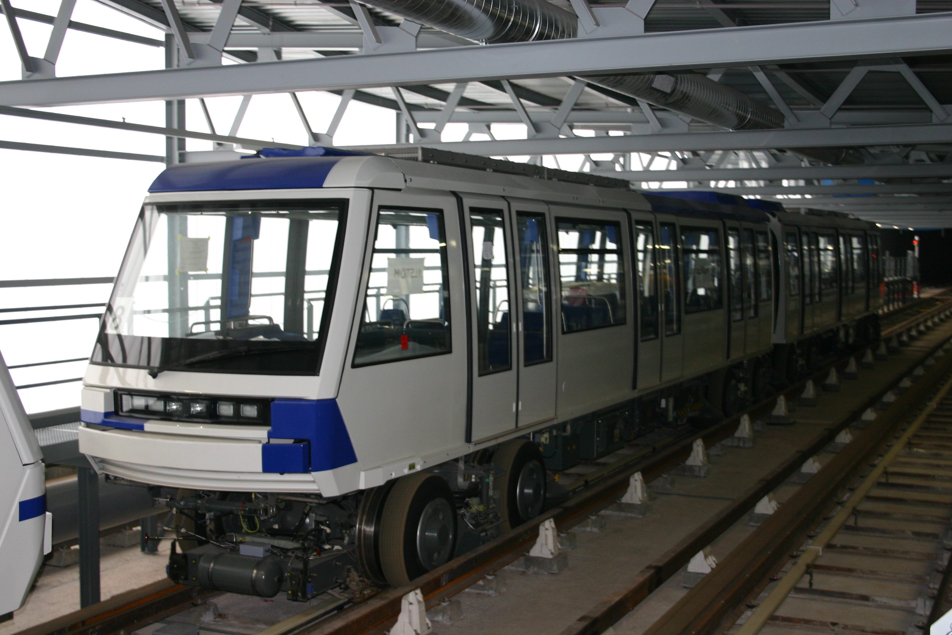 Photo d'une rame du nouveau métro de Lausanne prise dans le dépôt de Vennes